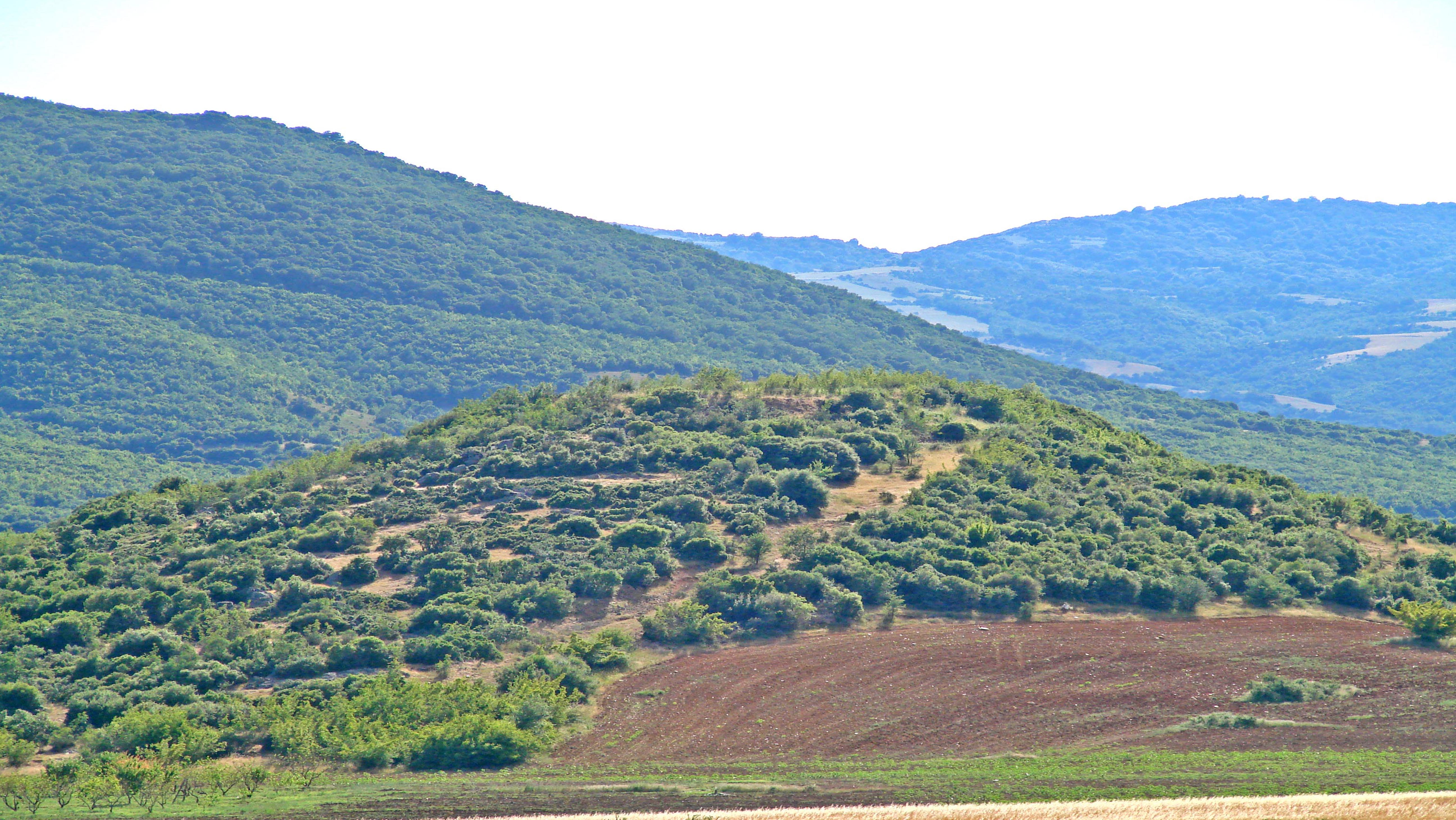 Ο προϊστορικός λόφος του Γκραντιστ, στα βορειοανατολικά του χωριού.